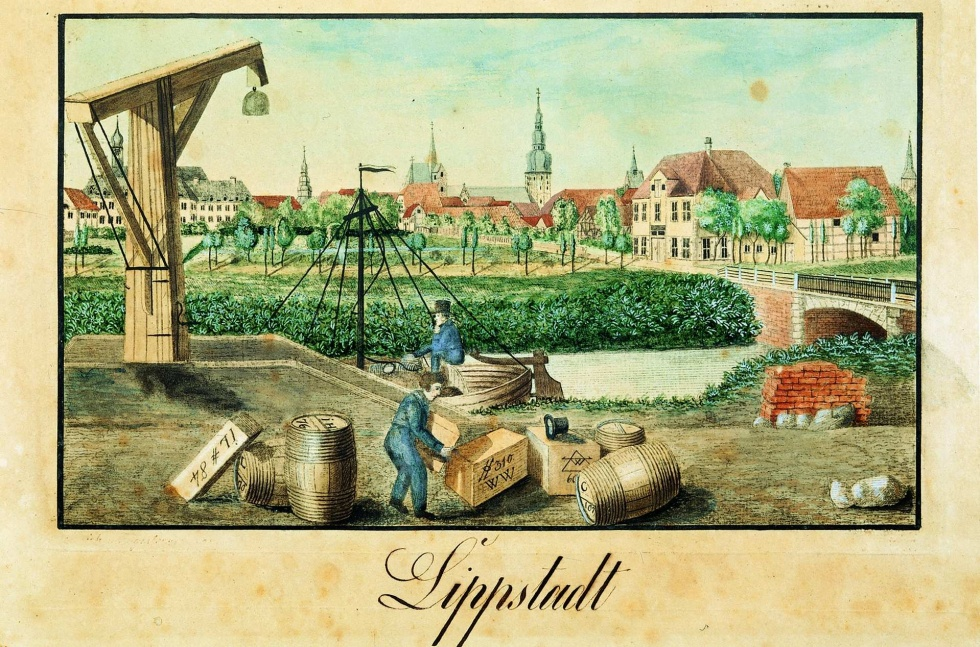 Lippstadt von Norden mit dem Hafen am Kanal; Gouache über Federzeichnung, Blattmaß: 17,2 x 28,7 cm; Städtisches Heimatmuseum Lippstadt